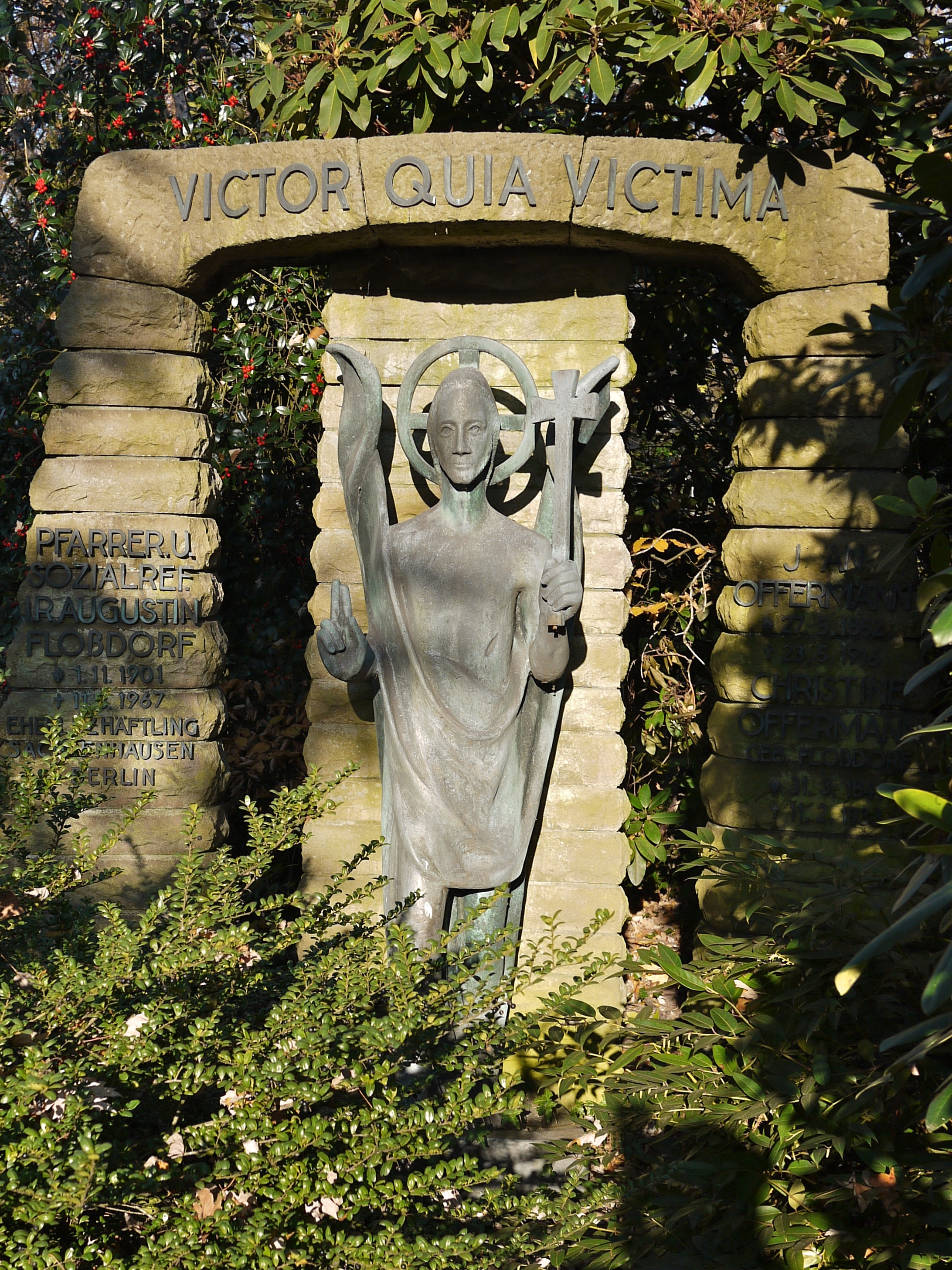 Haupttfriedhof in Mülheim an der Ruhr, Grabstätte Floßdorf/Offermann